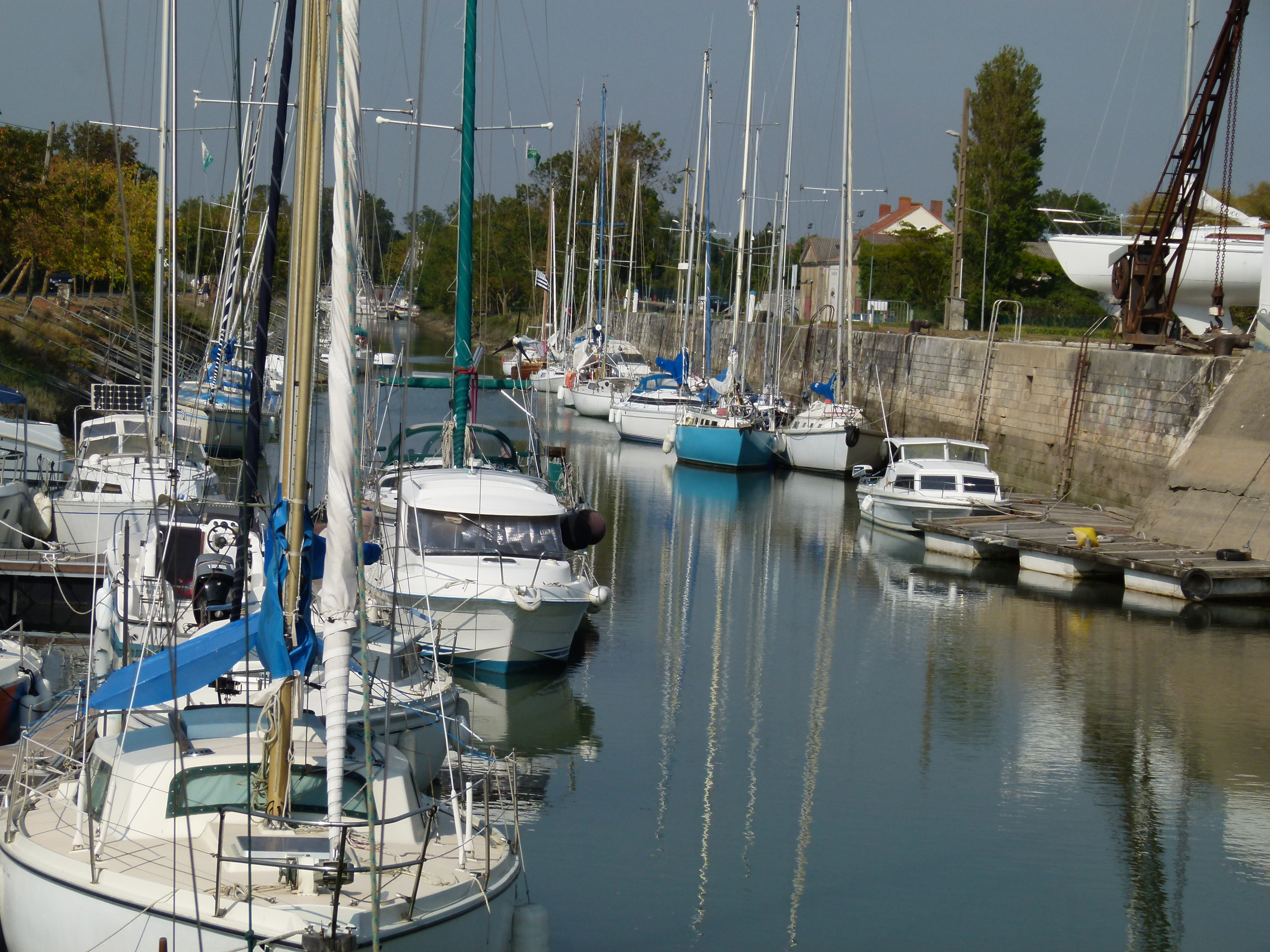 Le port de plaisance de Marennes fait partie du port de La Cayenne dont il constitue la partie nautique du site portuaire de Marennes (Charente-Maritime).